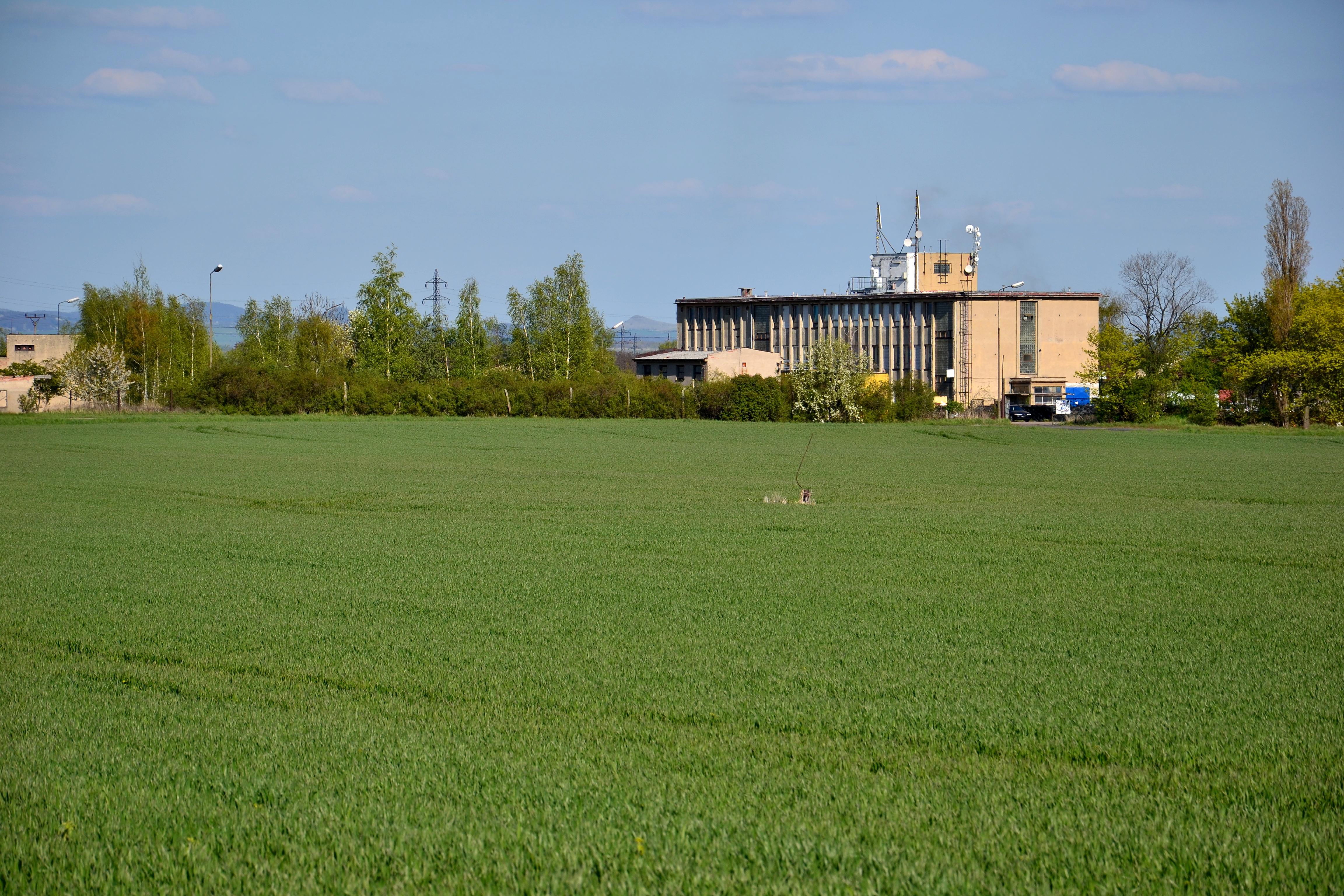 Okořín – areál bývalého dolu Běta od západu